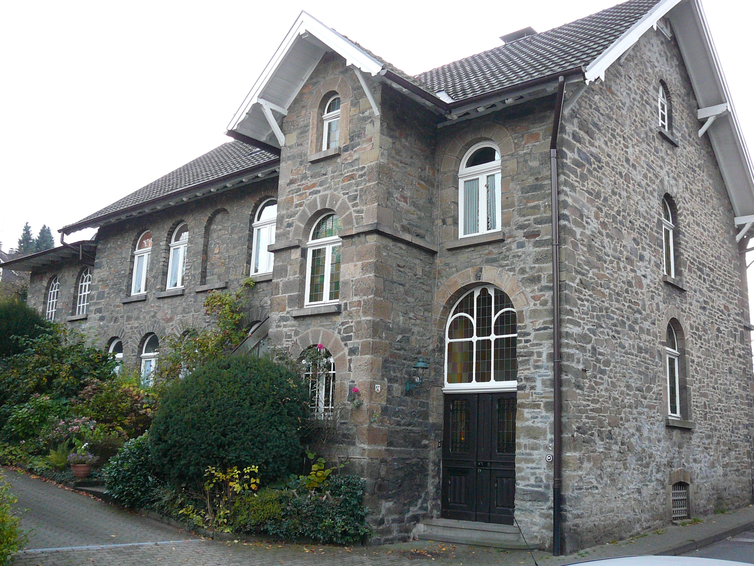 Am Kriegermal 34, Wuppertal